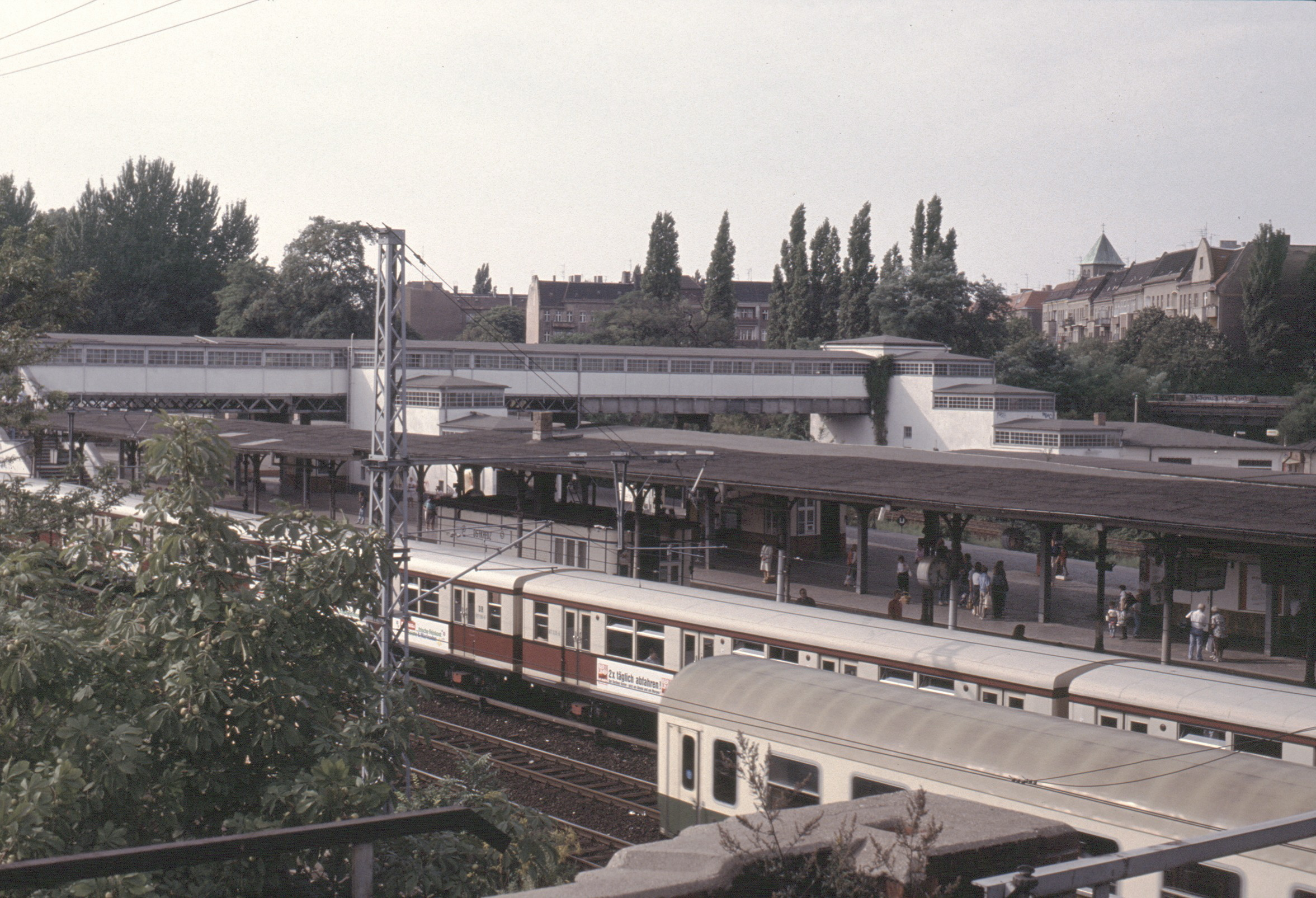 Bahnhof Berlin Ostkreuz